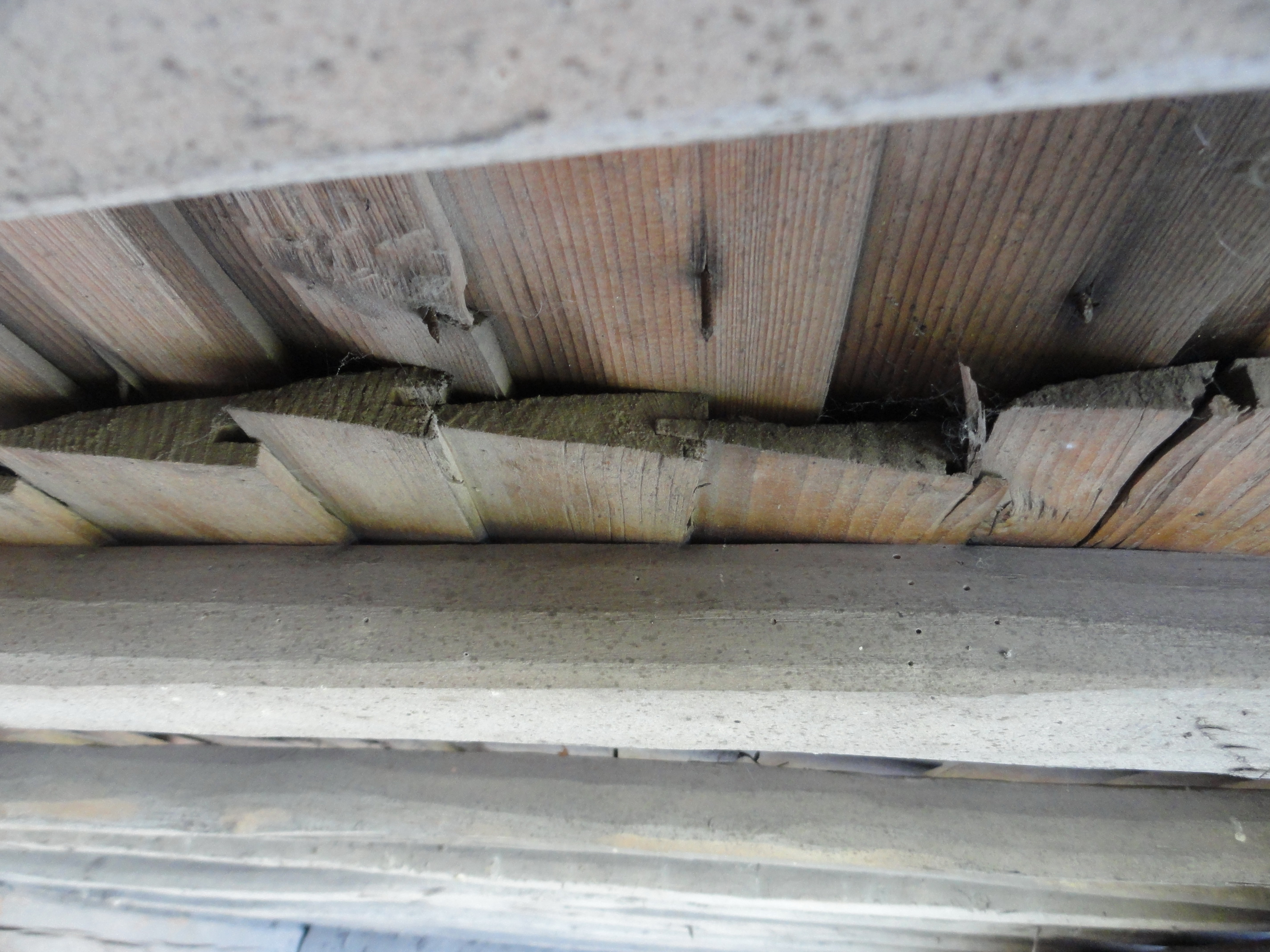 Кровля из гонты (с обратной стороны)